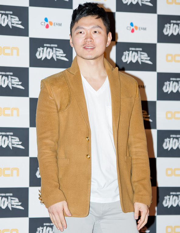 OCN 드라마 히어로 제작 발표회에 참석한 양동근